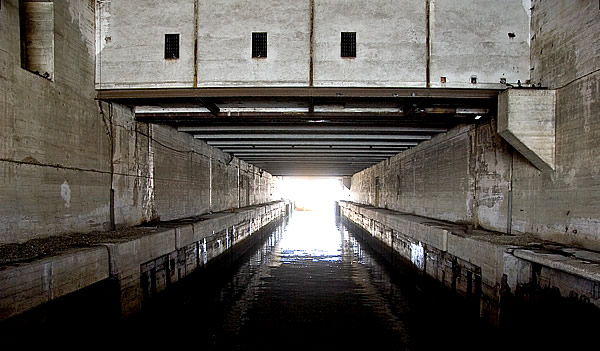 Base sous marine (WWII) du port de La Pallice. L'intérieur de l'écluse donnant accès au bassin à flot et protégeant les navires durant l'éclusage. Pep.per de Ré Photo issue de ma banque d'images